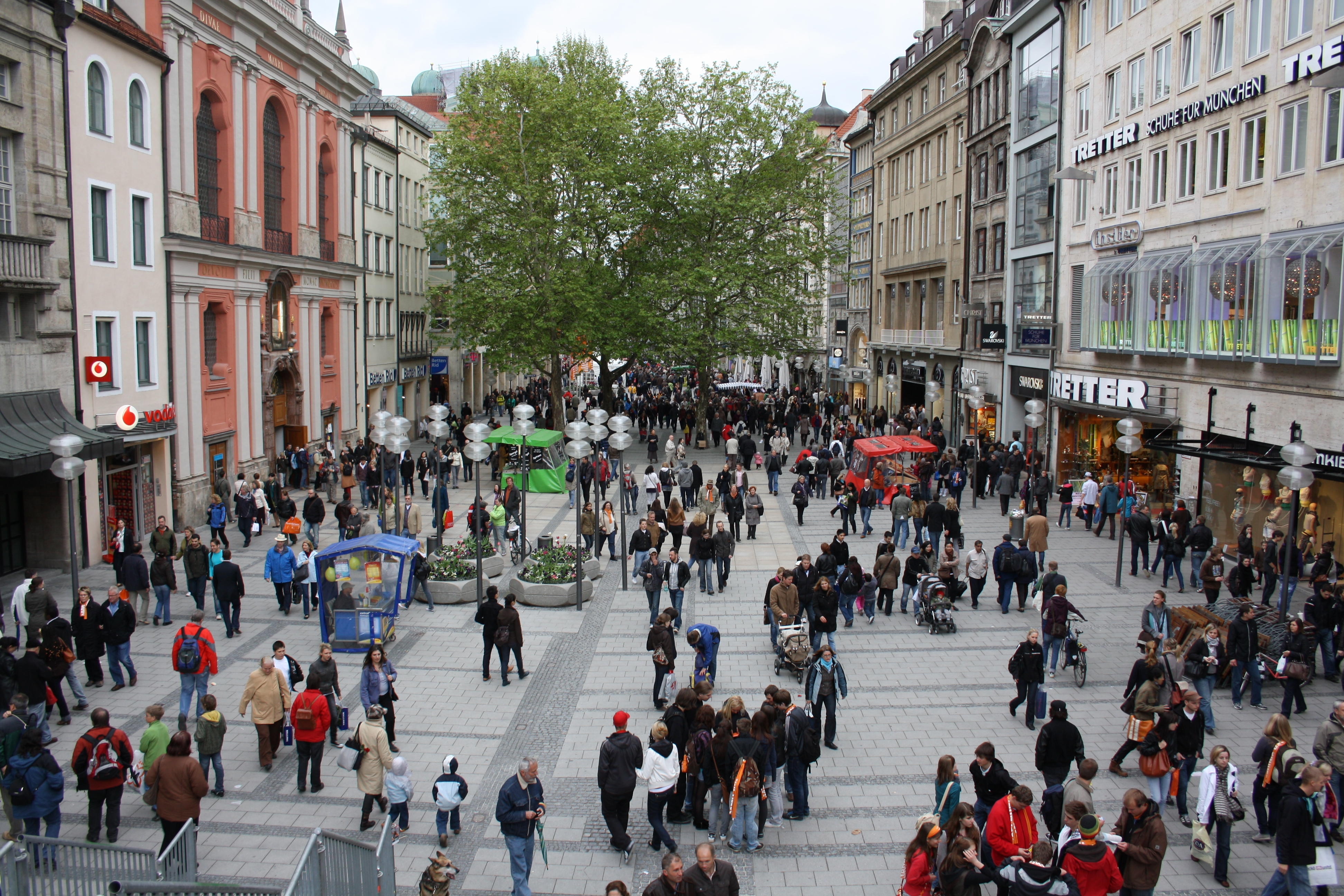 Ökumenischer Kirchentag 2010, München, Neuhauserstraße